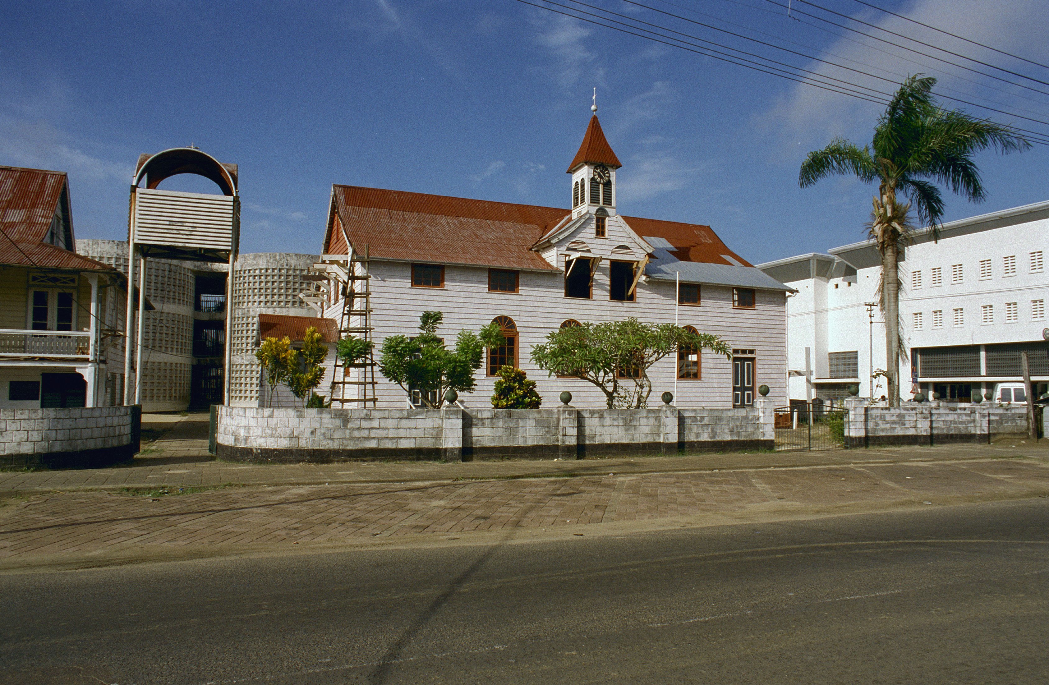 Rust en Vrede kerk en pastorie: Overzicht westgevel (opmerking: Suriname Reis Loek Tangel)